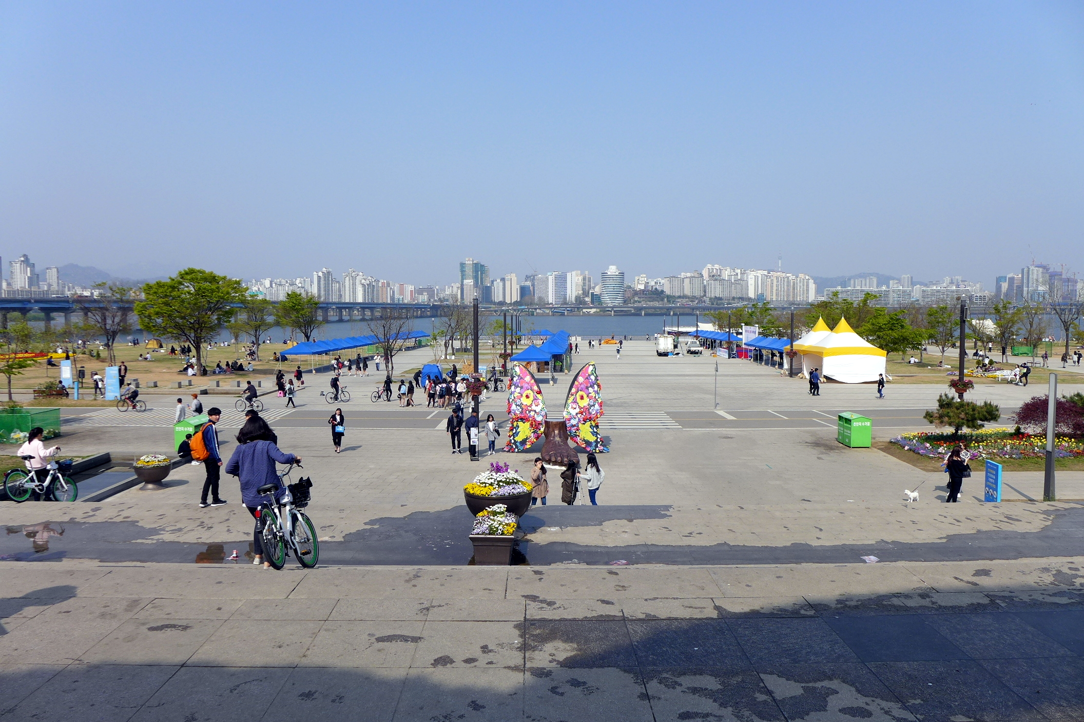 Hangang Park